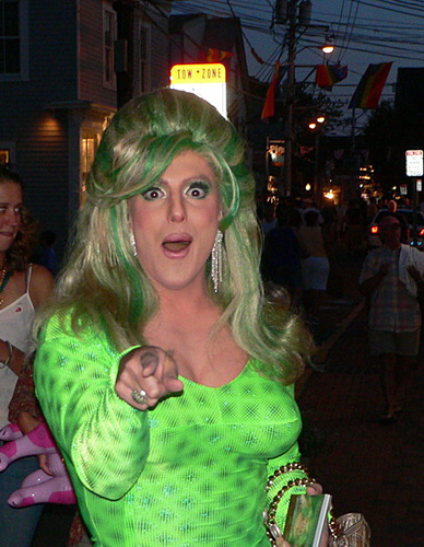 Hedda Lettuce